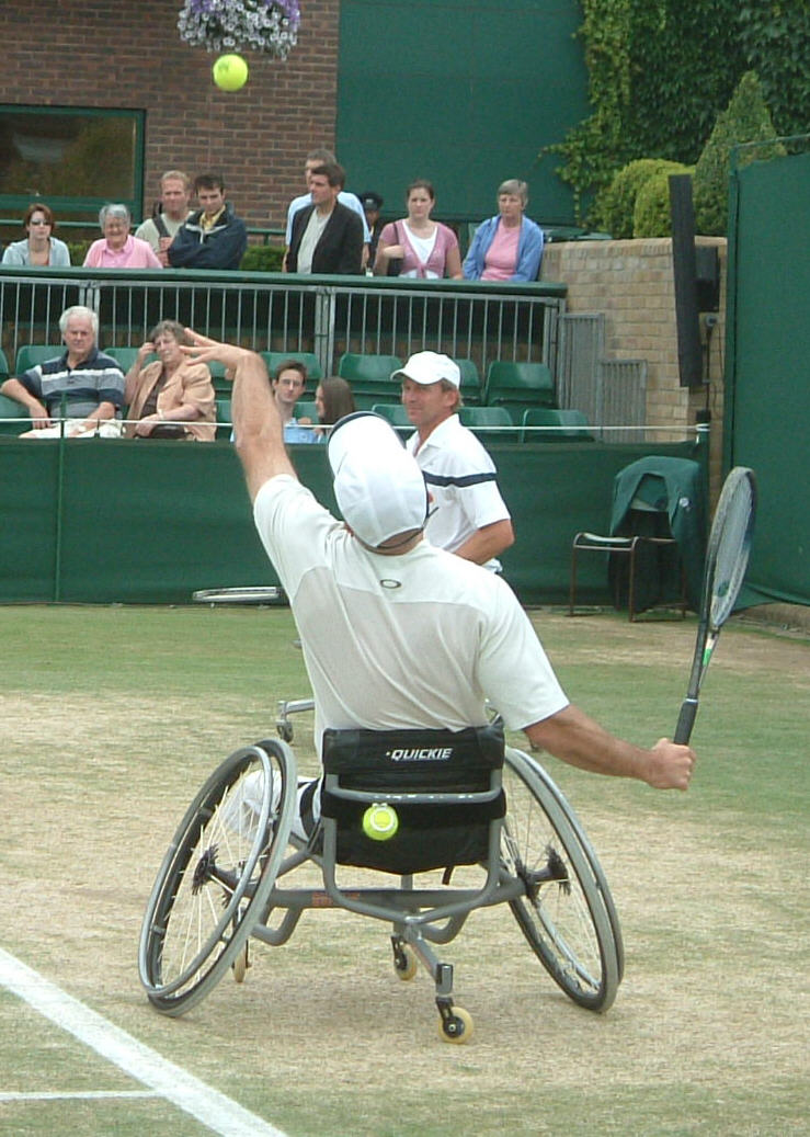 Stefan Jungermann beim Rollstuhltennis